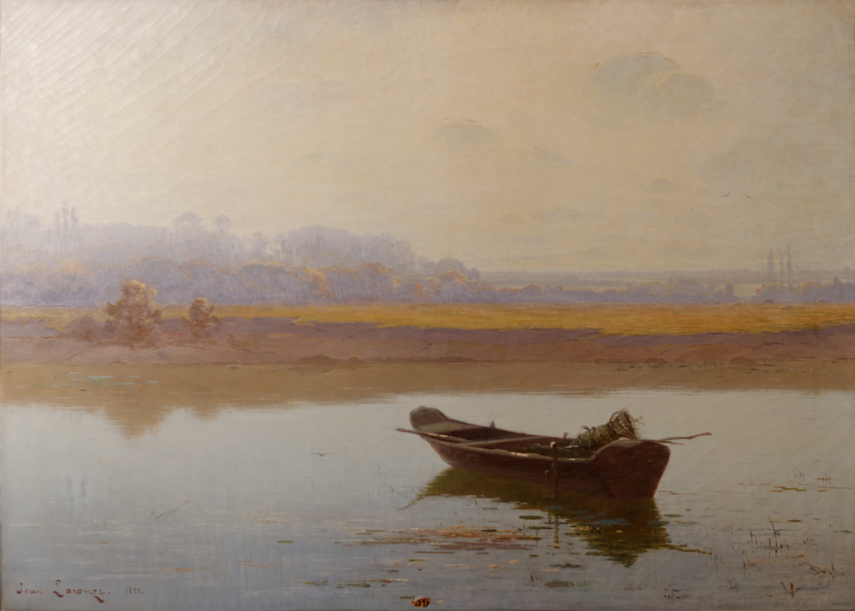 Le Calme (en Charolais), Jean Laronze 1899. S.D.b.g "Jean Laronze 1899". Huile sur toile 131 x 181 cm. Dépôt de l’État en 1902. Inv A.454 Musée des Ursuline de Mâcon